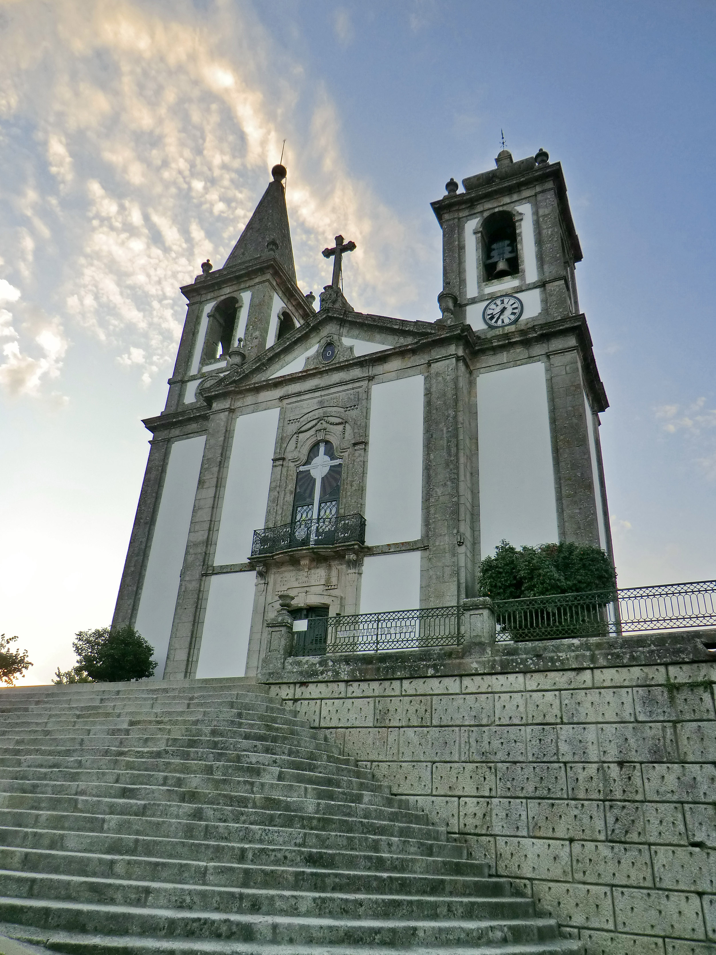 Largo do Mosteiro do Bom Jesus de Barrosas e estrada municipal This file was uploaded for Wiki Loves Monuments in Portugal with the unique identifier 72345.